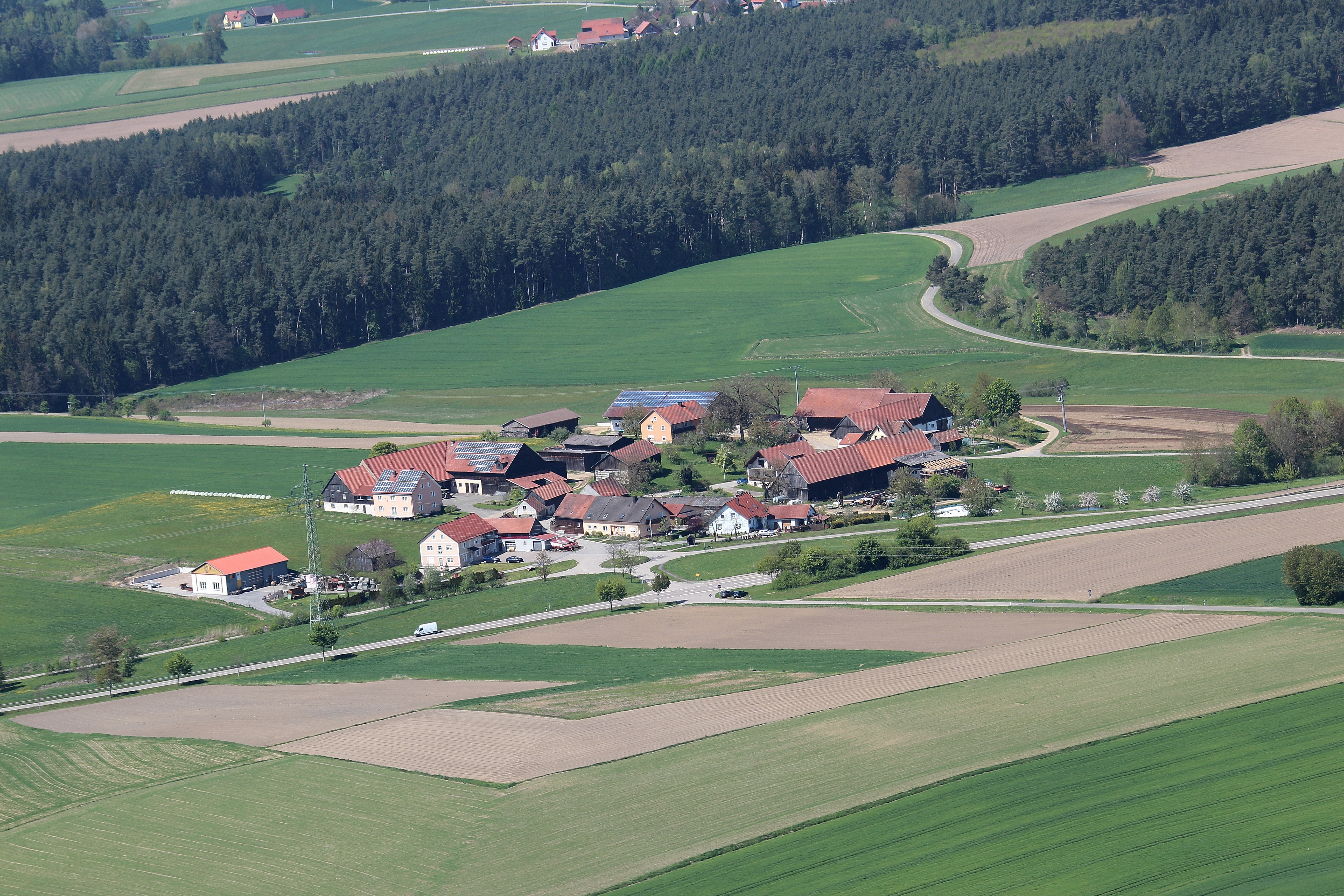 Ebersdorf, Stadt Neunburg vorm Wald;Landkreis Schwandorf, Oberpfalz, Bayern